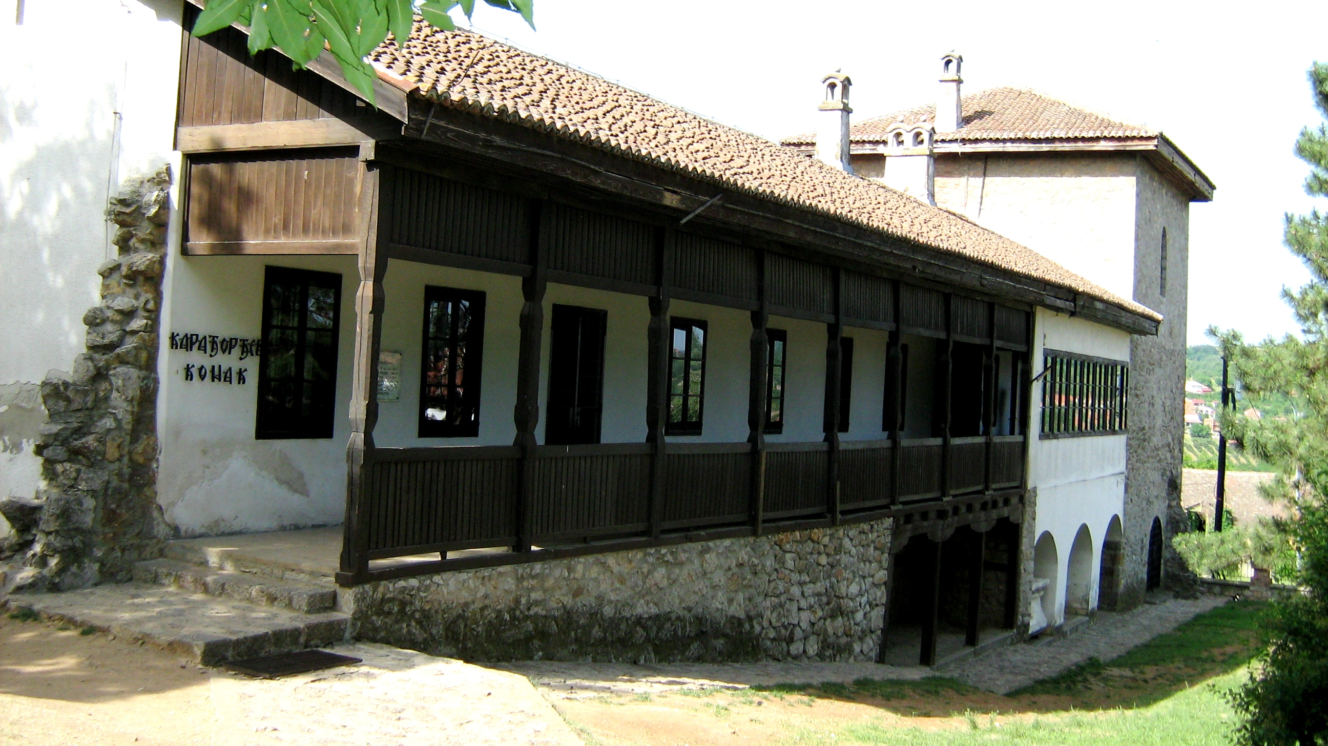 Karađorđev grad, Topola